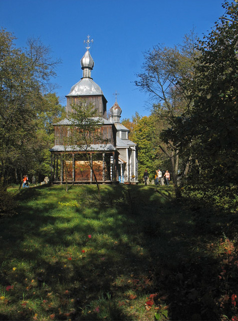 Комплекс музею народної архiтектури та побуту (скансен) в Переяславі-Хмельницькому